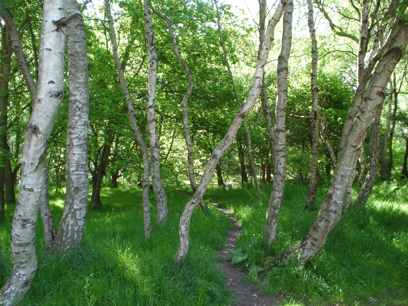 A greenwood glade in Sherwood Forest